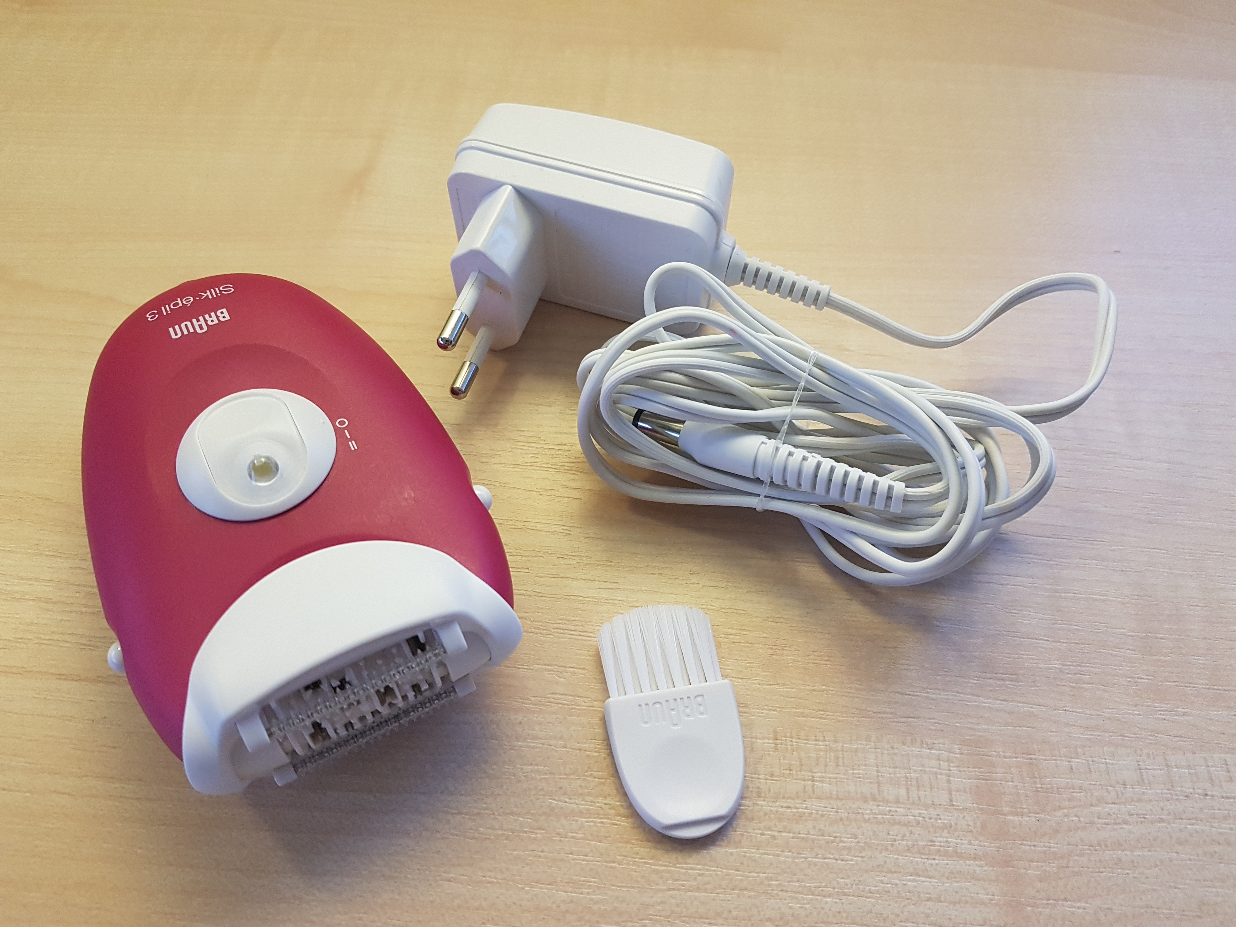 Braun Silk-épil 3 epilaator toitejuhtmega